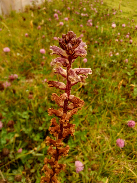 Planta de Orobanche minor